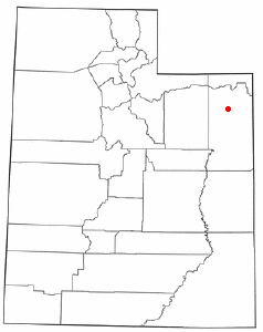 Localización de Maeser, Utah